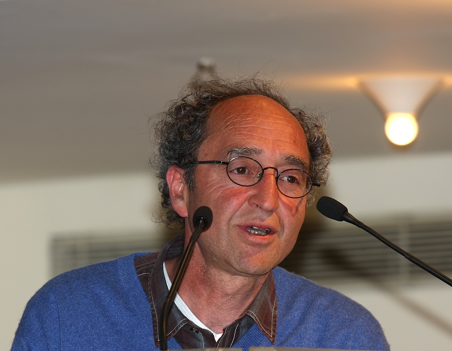 Doğan Akhanlı, türkischer Schriftsteller, auf der Veranstaltung „Aus der Geschichte lernen - Die Kölner Friedensverpflichtung leben“ im Gürzenich im Rahmen von „Köln stellt sich quer“.